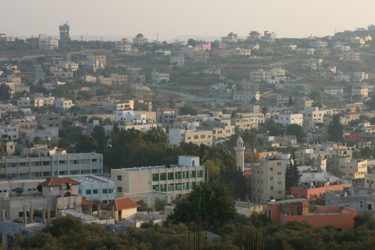 Die Stadt Salfeet (Salfit) in Palästina. Object location32° 05′ 03″ N, 35° 10′ 54″ E View all coordinates using: OpenStreetMap - Google Earth